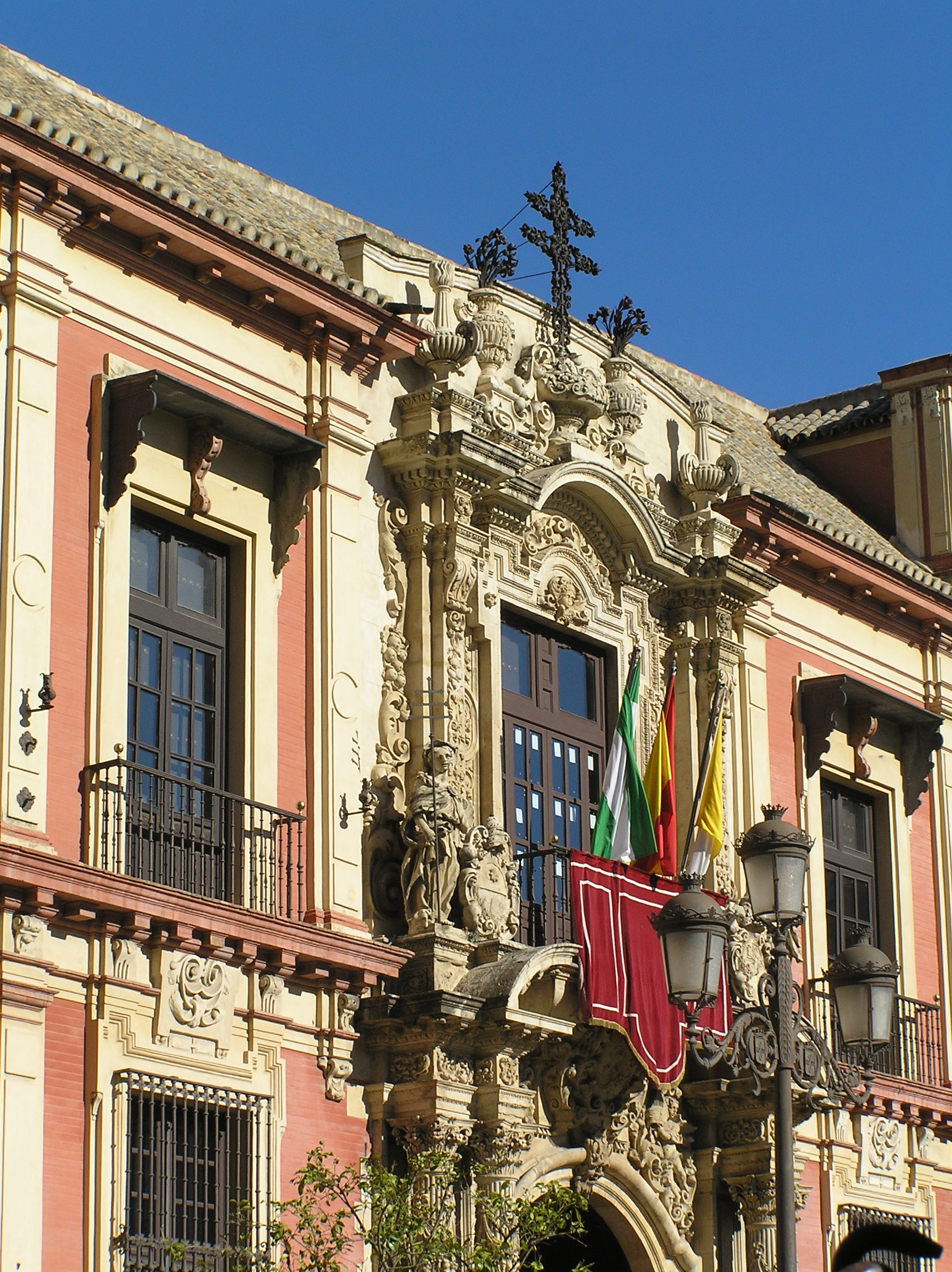 Entrada principal al Palacio arzobispal de Sevilla, (España).